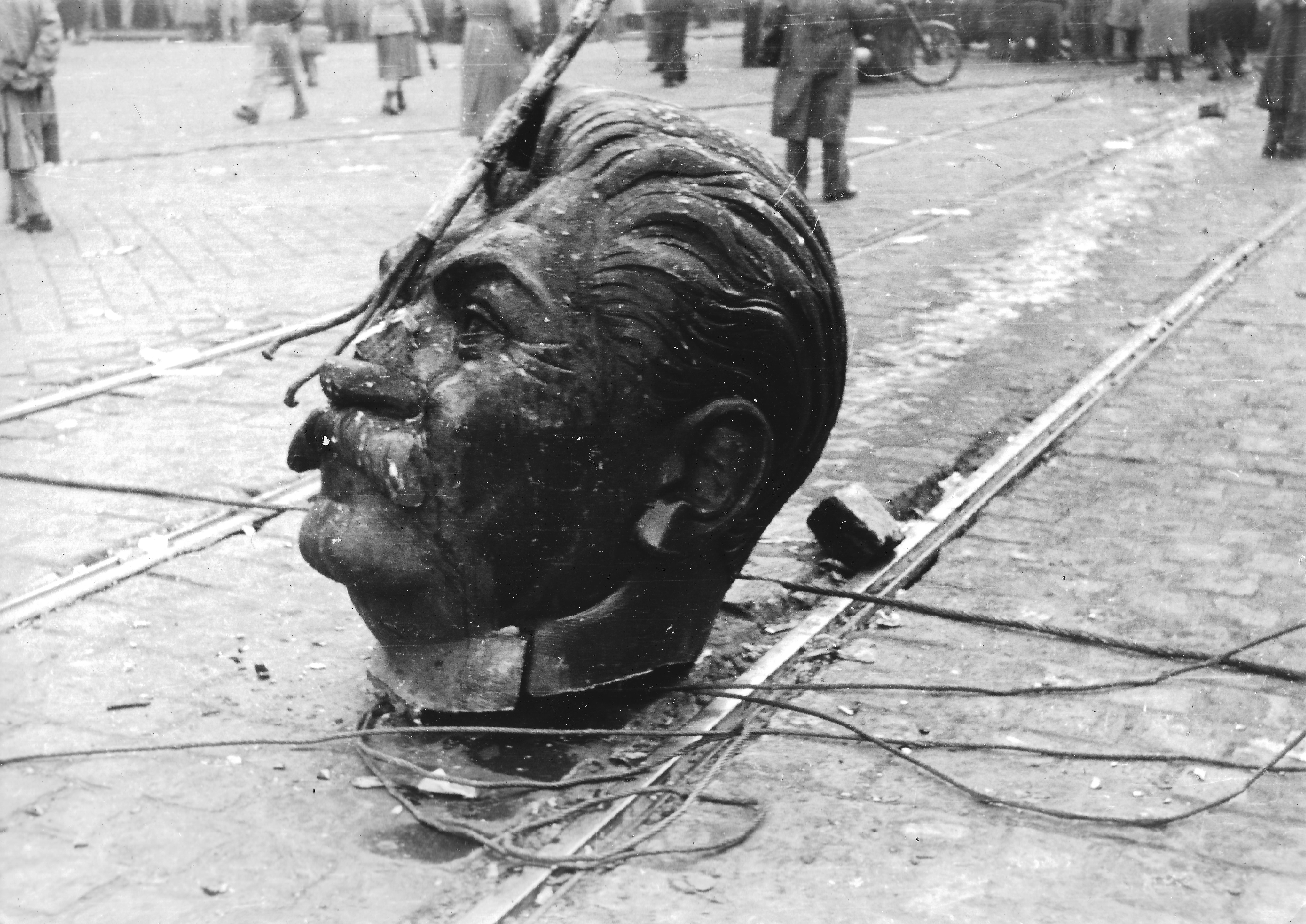 Nagykörút - Rákóczi út kereszteződése, a Sztálin-szobor darabolása.